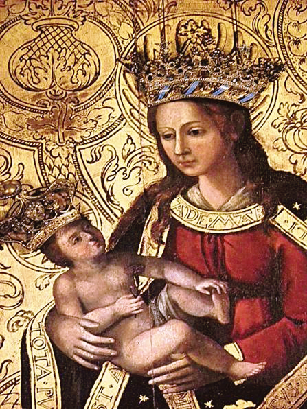 Tableau de Notre-Dame-de-Bonne-Nouvelle. Basilique Saint-Aubin en Notre-Dame-de-Bonne-Nouvelle de Rennes (35).